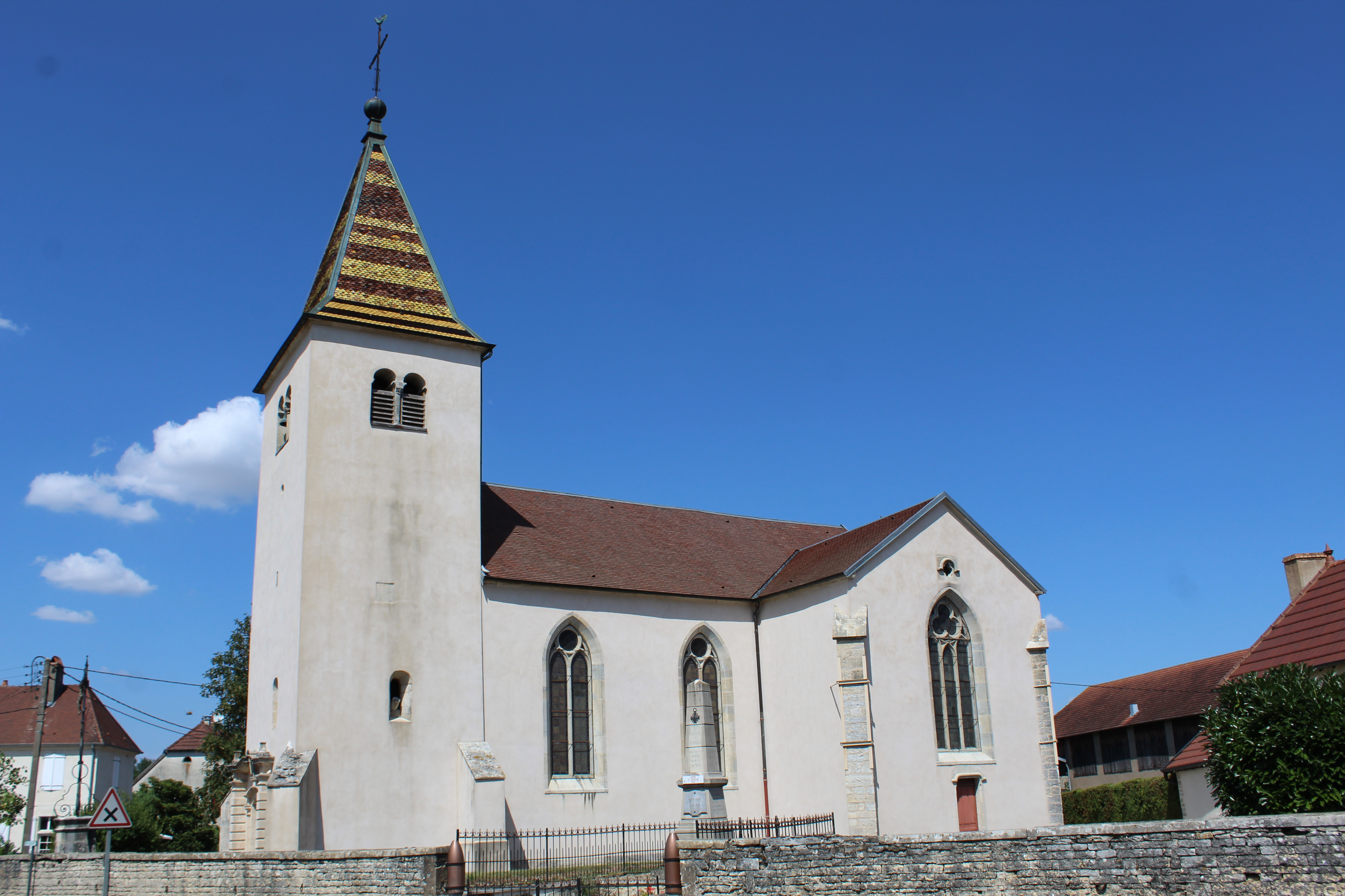 L'église